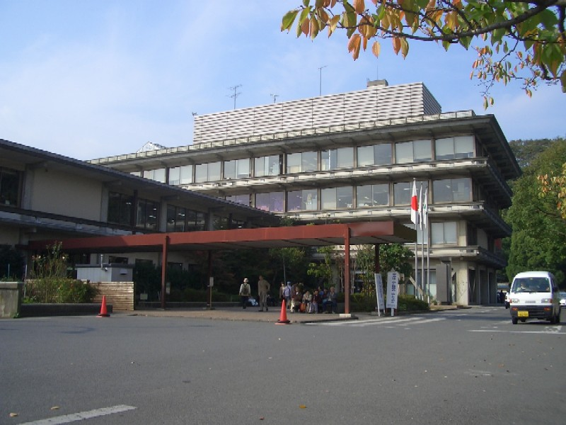 Kamakura City Hall in Kanagawa Prefecture, Japan